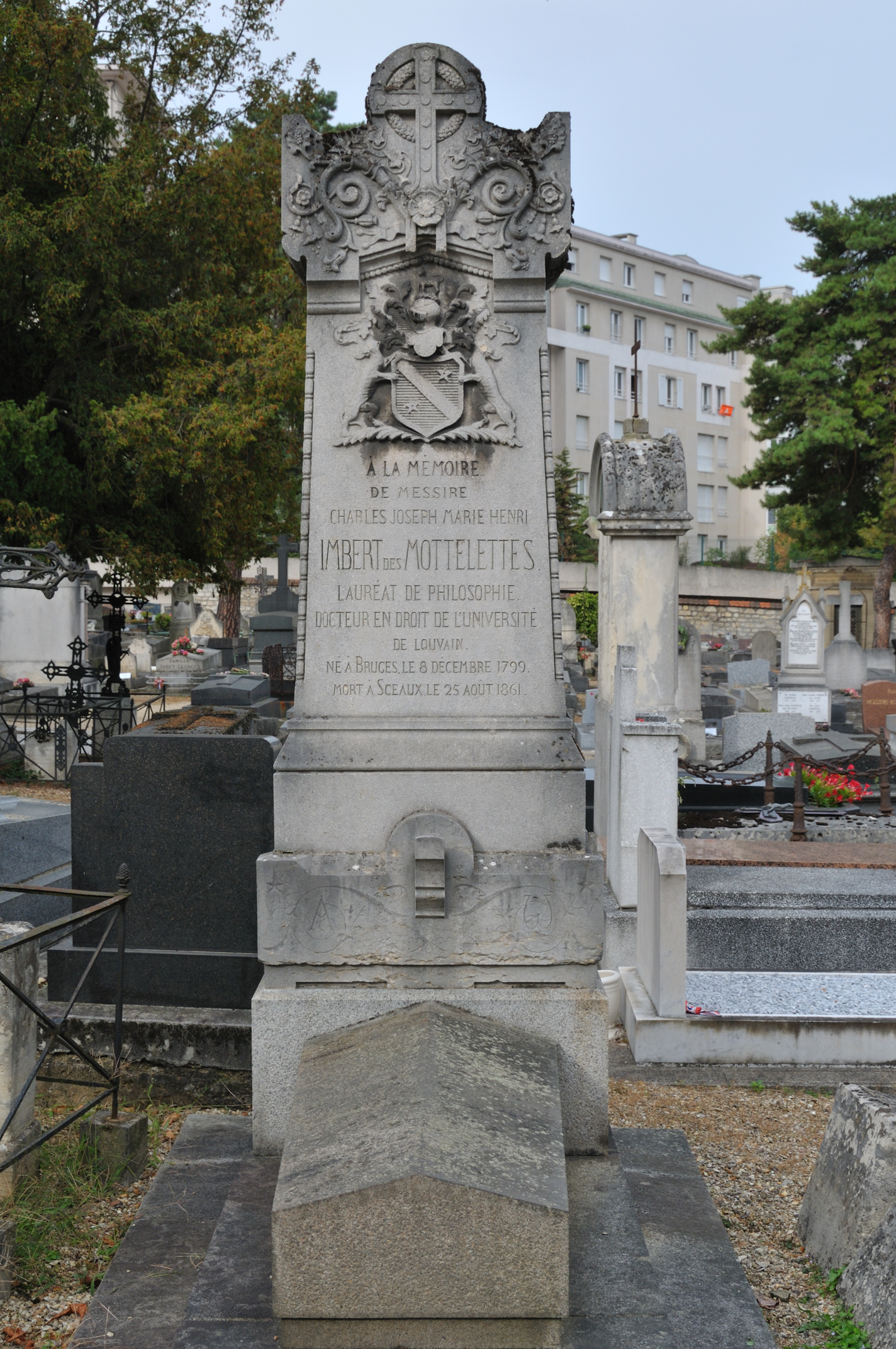 Cimetière de Sceaux, Hauts-de-Seine, France